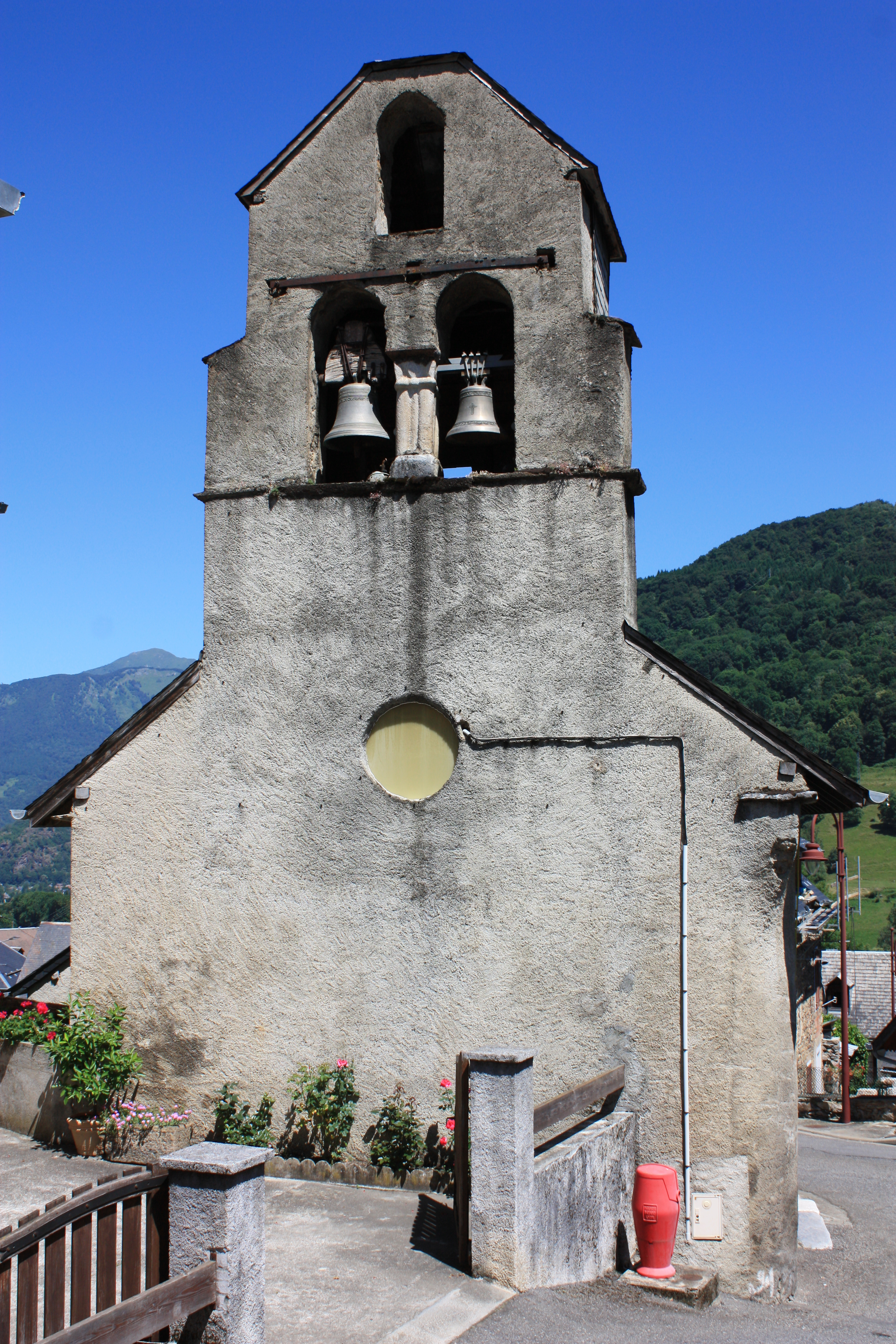 Signac - Eglise Saint-Jean-Baptiste